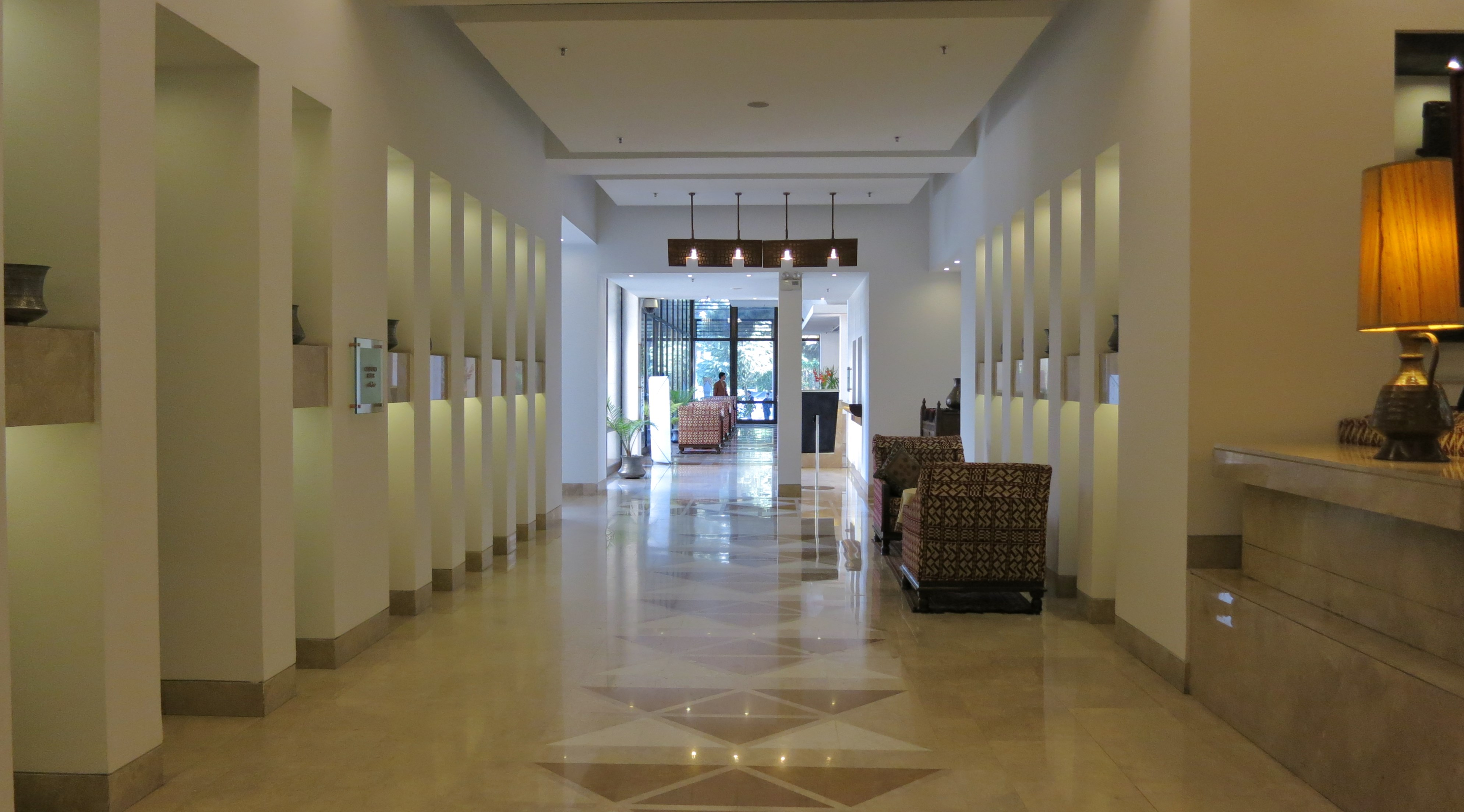 Kabul, Afghanistan, Serena Hotel